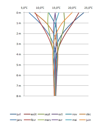 amortissement thermique des fluctuations météorologiques en fonction de la profondeur et du mois de l'année